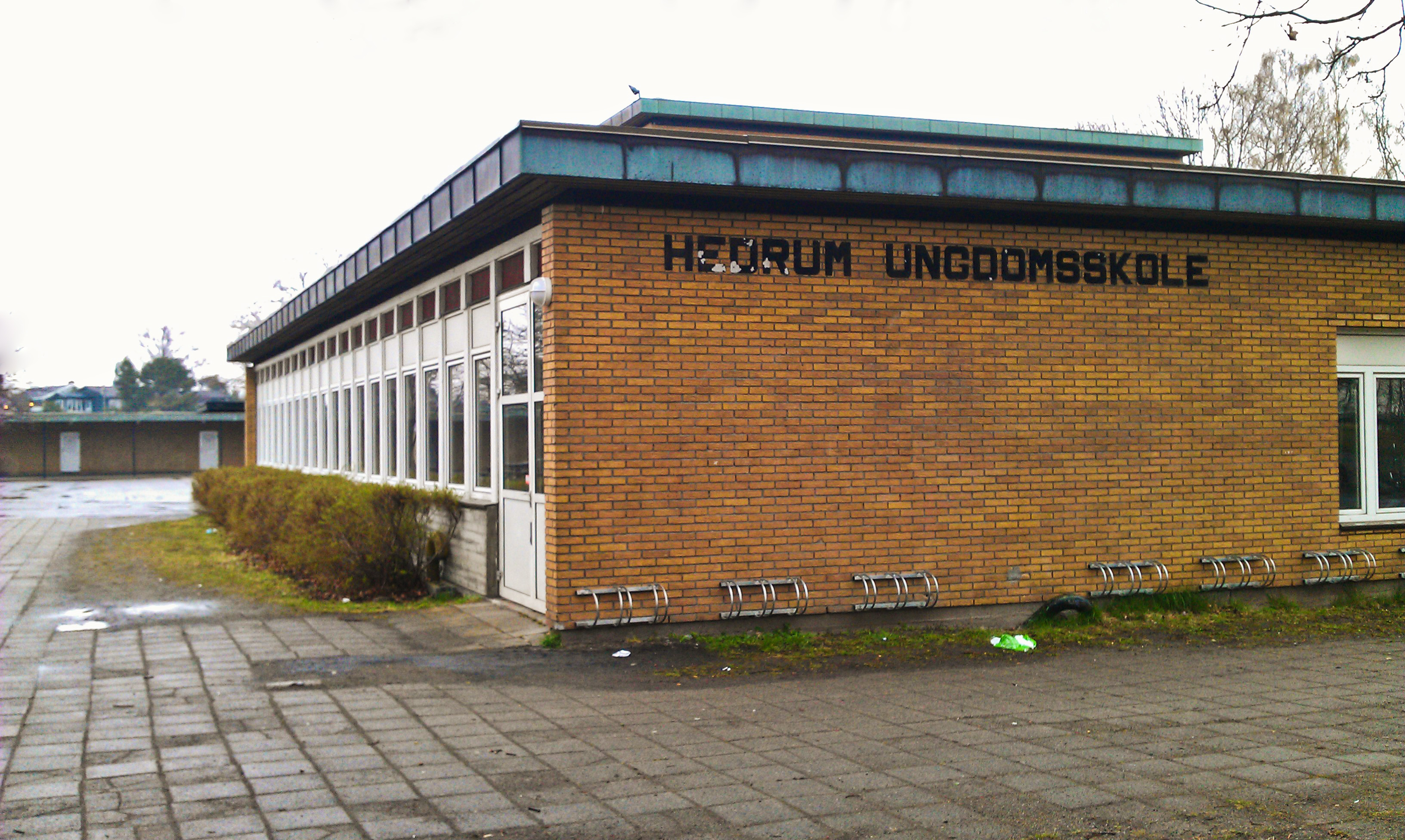 Hedrum Ungdomsskole, Larvik